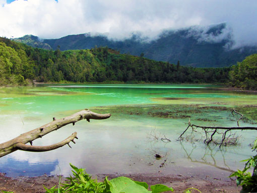 Versteckt zwischen Hügeln und Wäldern auf einer Höhe von mehr 2000 Meter über dem Meeresspiegel zieht der Telaga Warna die Besucher in seinen Bann. Dieser See ist eine mit Wasser gefüllte vulkanische Caldera, in welcher sich kleine aktive Gasschlote befinden.